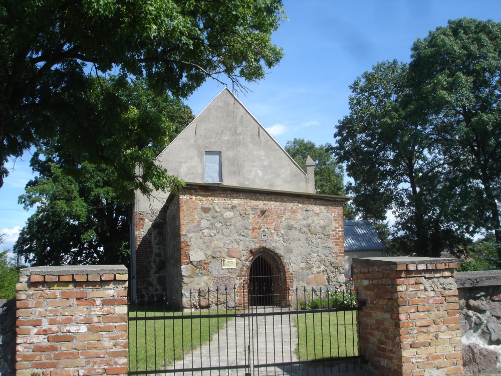 Kościół w Ulikowie, gmina Stargard Szczeciński, powiat stargardzki